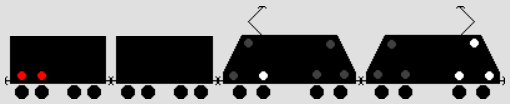 Beleuchtung Doppeltraktion in der Schweiz